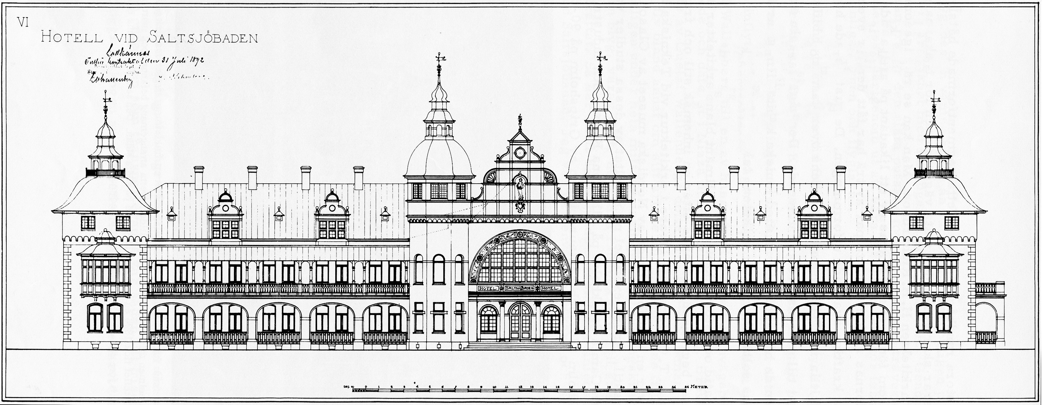 Fasadritning till Grand Hotell Saltsjöbaden